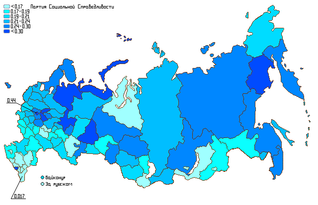 Результаты политической партии ПСС на парламентских выборах 2007 года (по регионам)